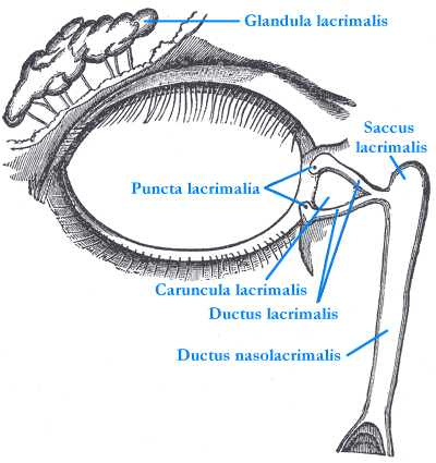 Lacrimal organs